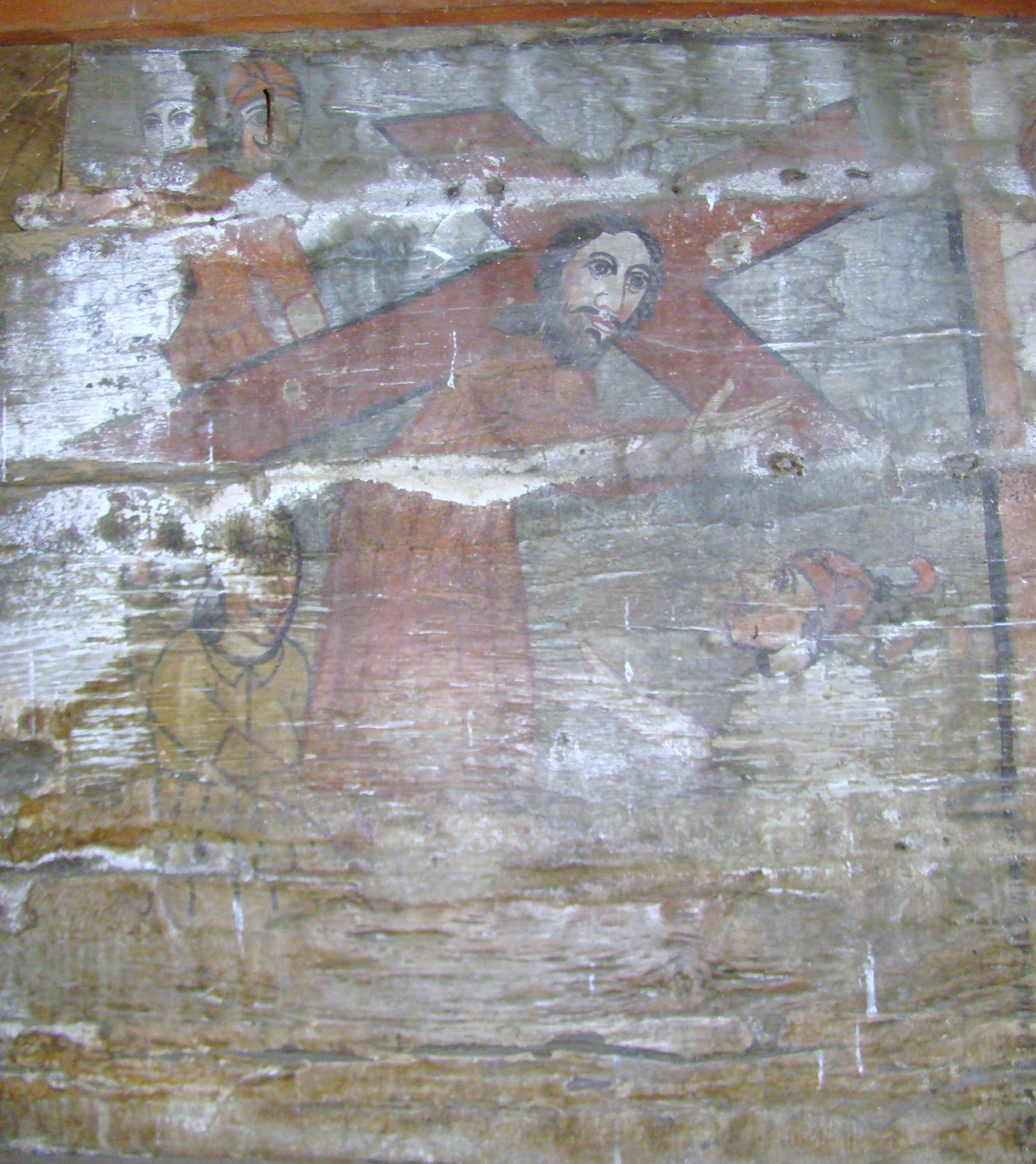 Biserica de lemn din Gârbău Dejului